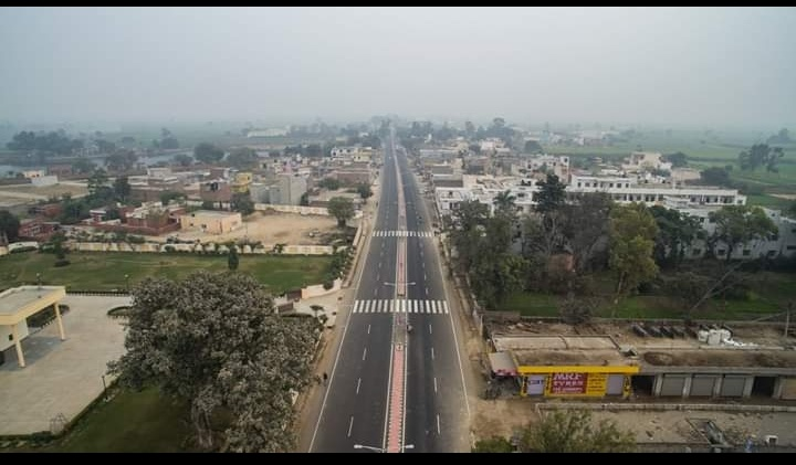 SH-8